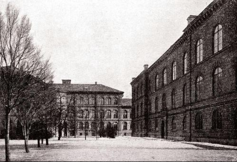 Bâtiment Institut Karolinska